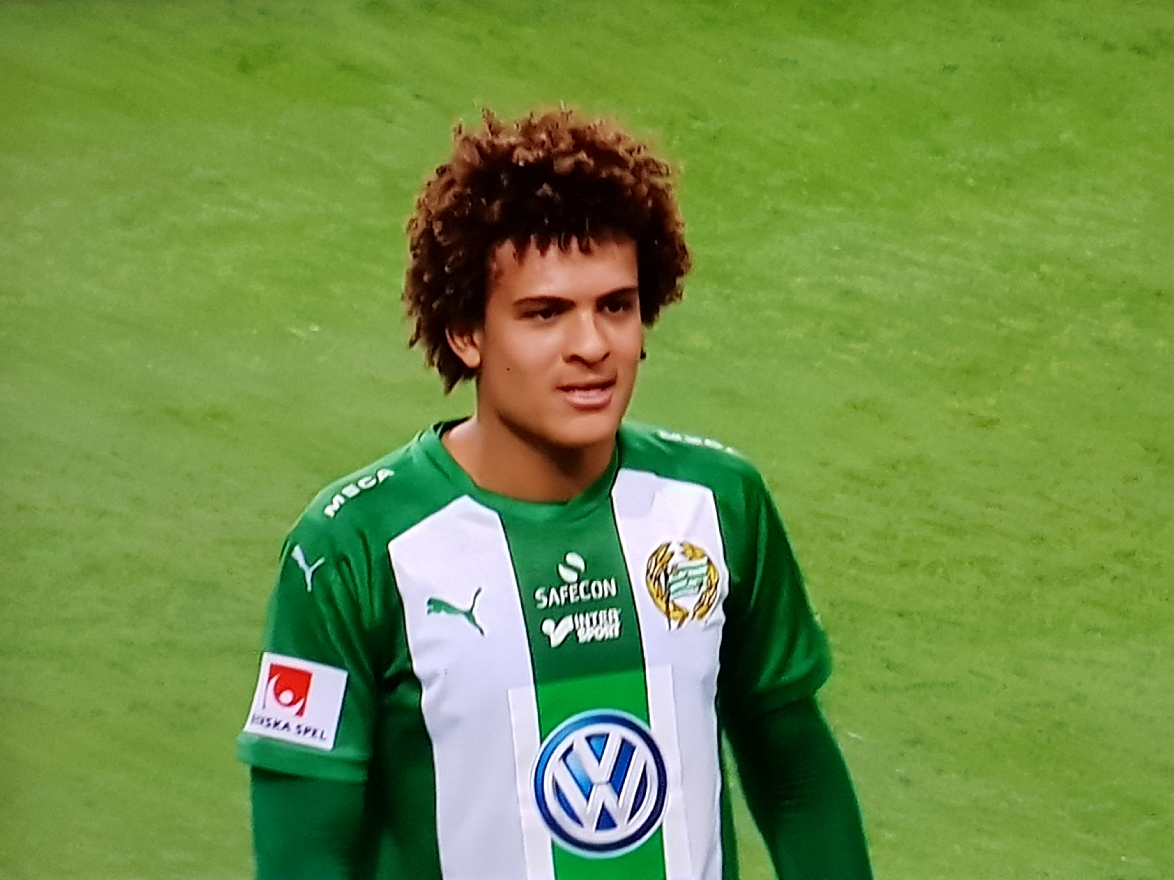 Neto Borges, Vasalund - Hammarby in Svenska Cupen 2018 at Tele 2 Arena, Stockholm, 2018-02-18. His first match for Hammarby.